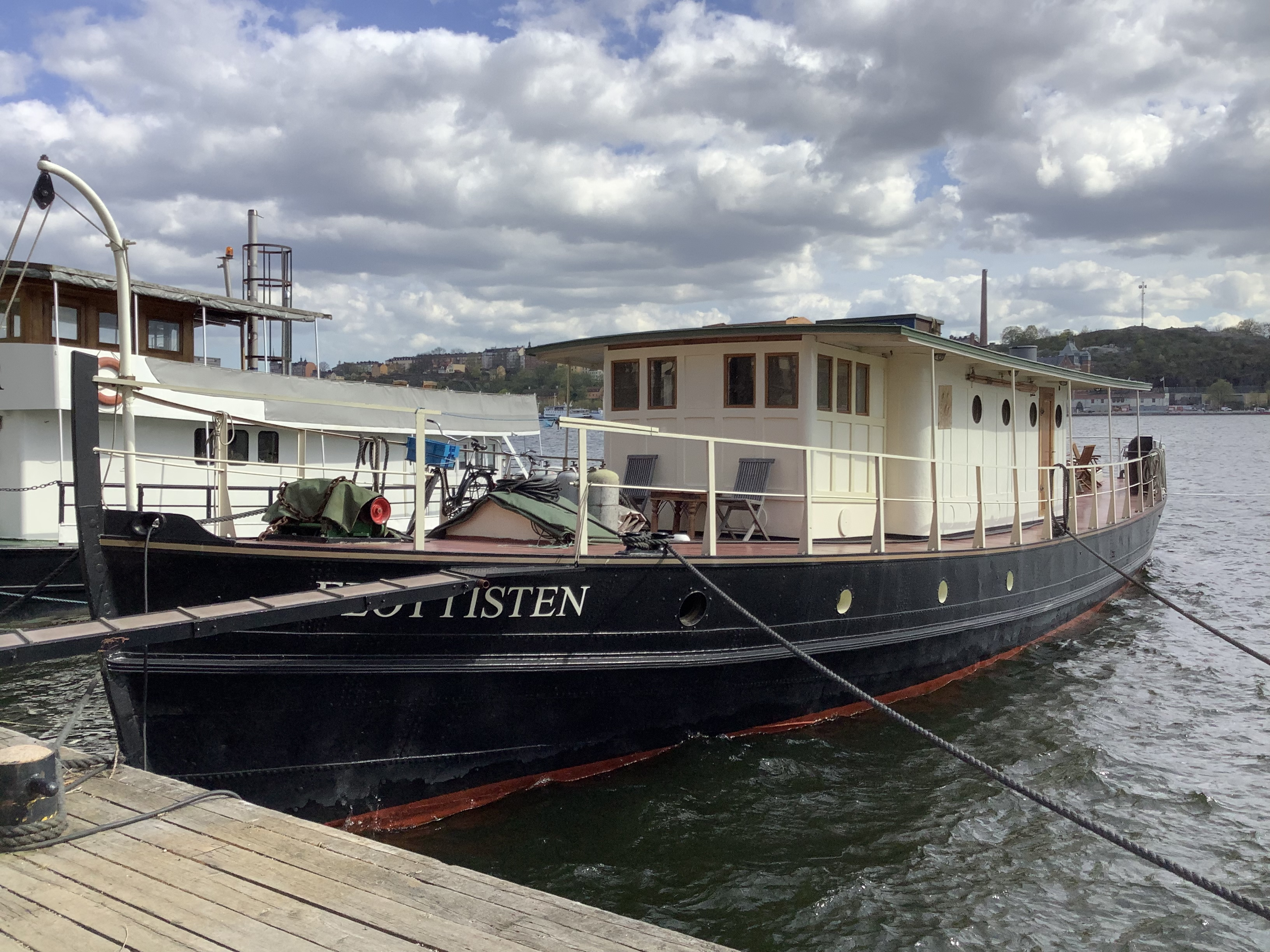 Flottisten, ursprungligen byggt 1862 som ångbogseringsfartyg, av Motala Verkstad.